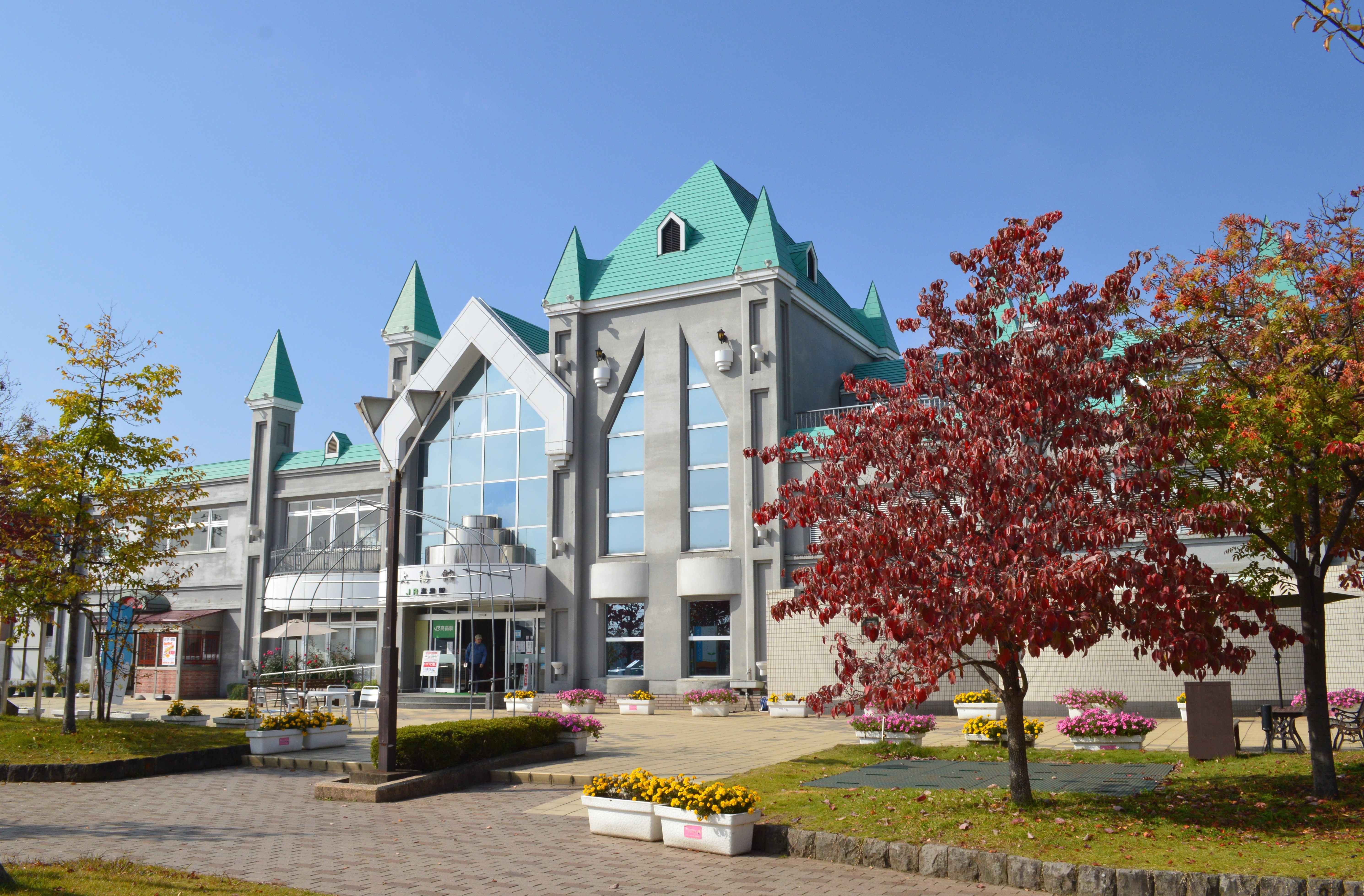 高畠駅 駅舎